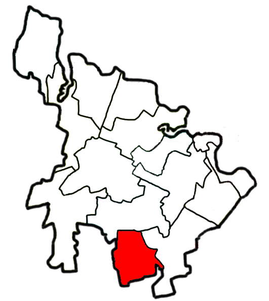 Малоолександрівська сільська рада, Верхньодніпровський район